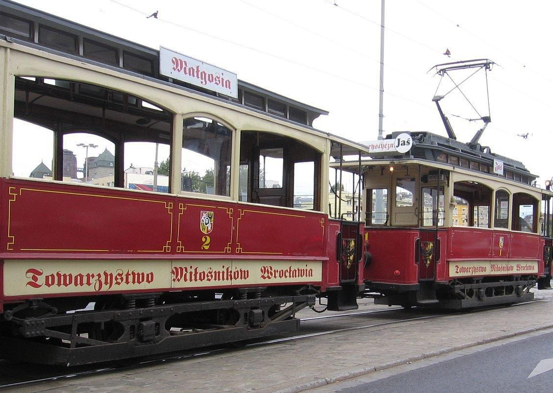 Tramwaj wycieczkowy Towarzystwa Miłośników Wrocławia "Jaś i Małgosia" na ulicy Piotra Skargi